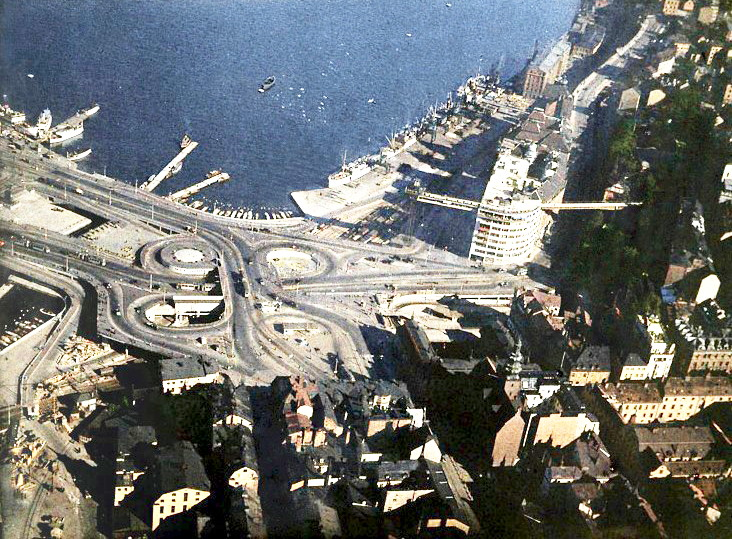 Flygbild över Slussen 1936 (digitally restored version)